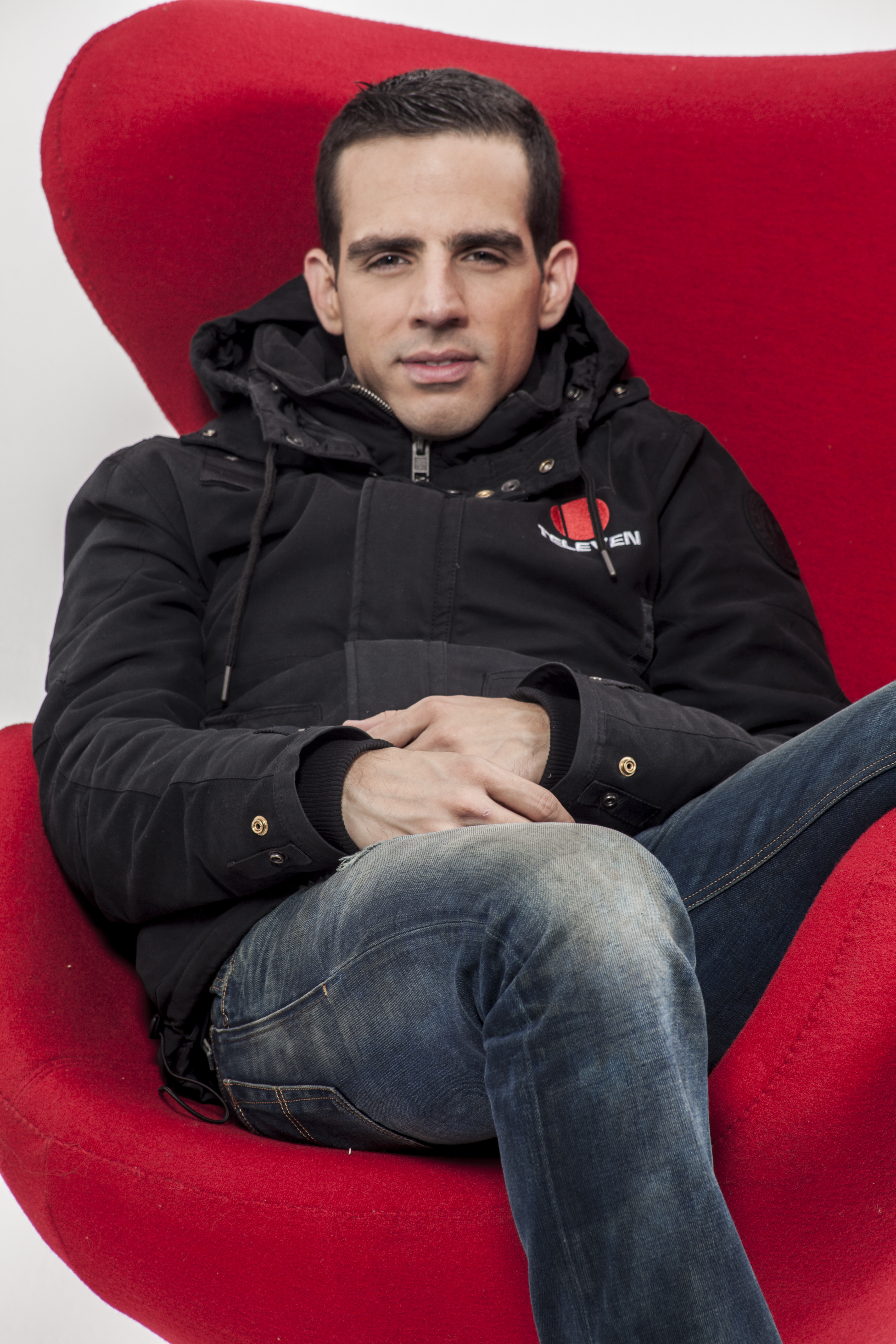 Luis Olavarrieta - Detrás de las Cámaras (Televen)